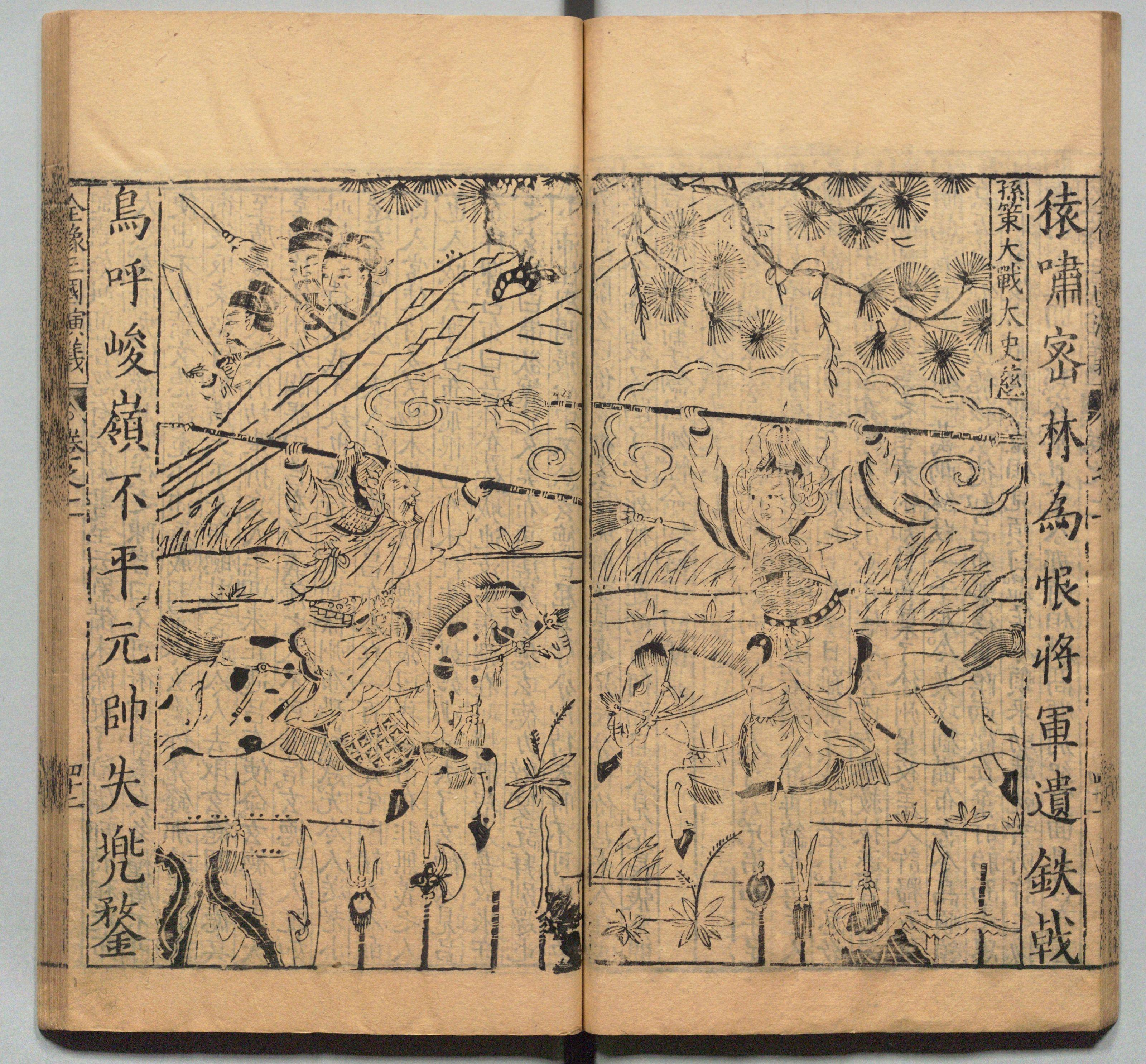 《新刊校正古本大字音释三国志通俗演义》 明万历十九年书林周曰校刊本